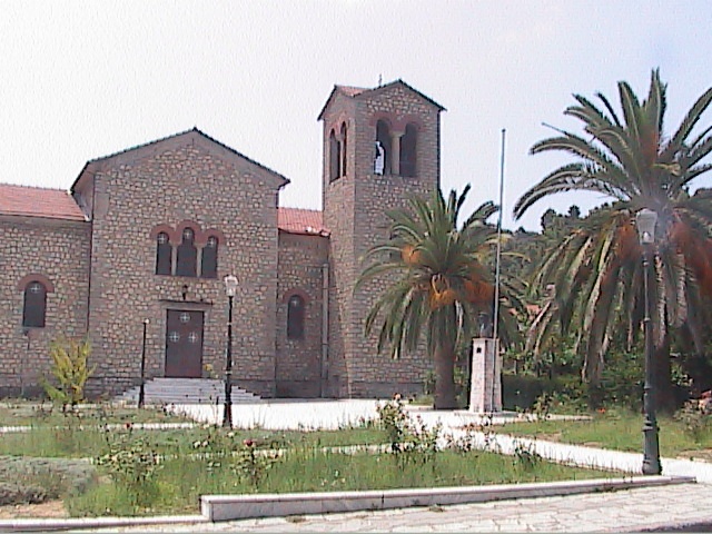 La piazza principale del paese di Olimpia Nuova e la chiesa di Santa Maria Ortodossa